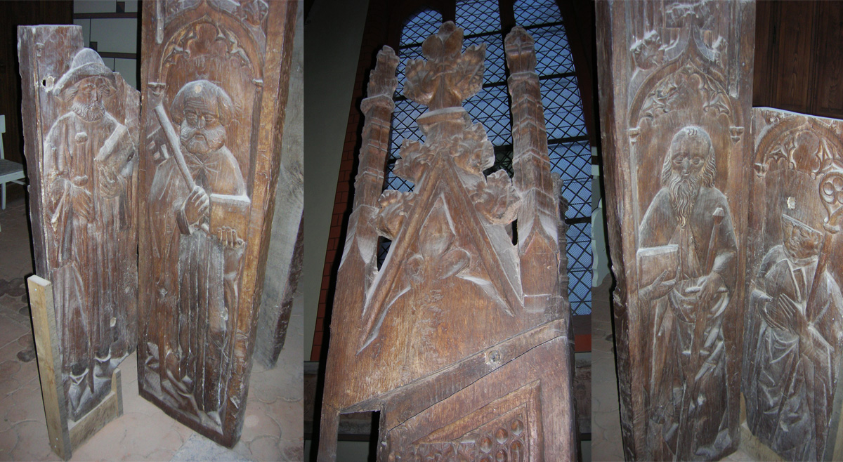 Reste des einstigen Chorgestühls der Stadtkirche Gadebusch